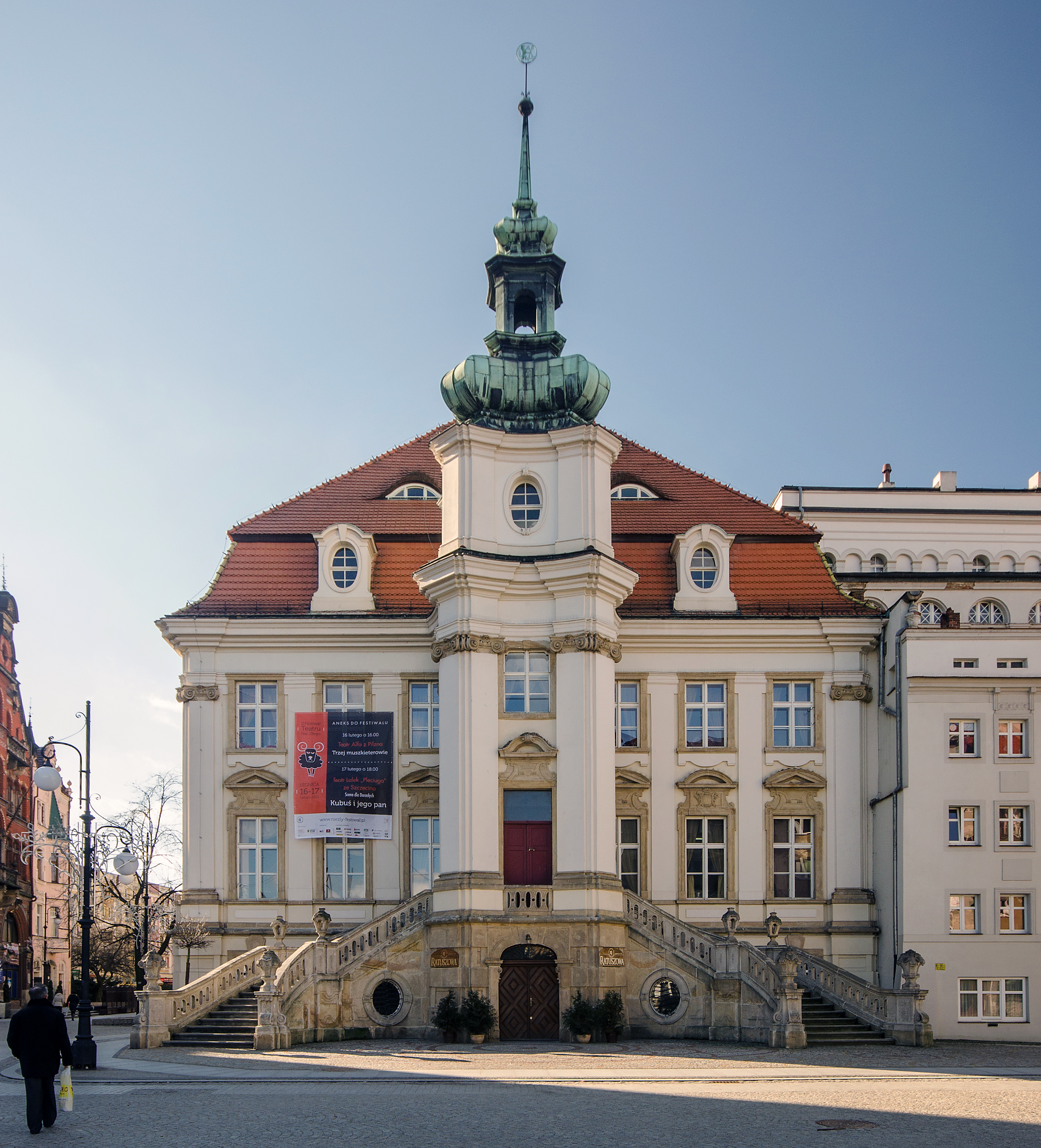 Legnica, stary ratusz, 1737-1741, 1930